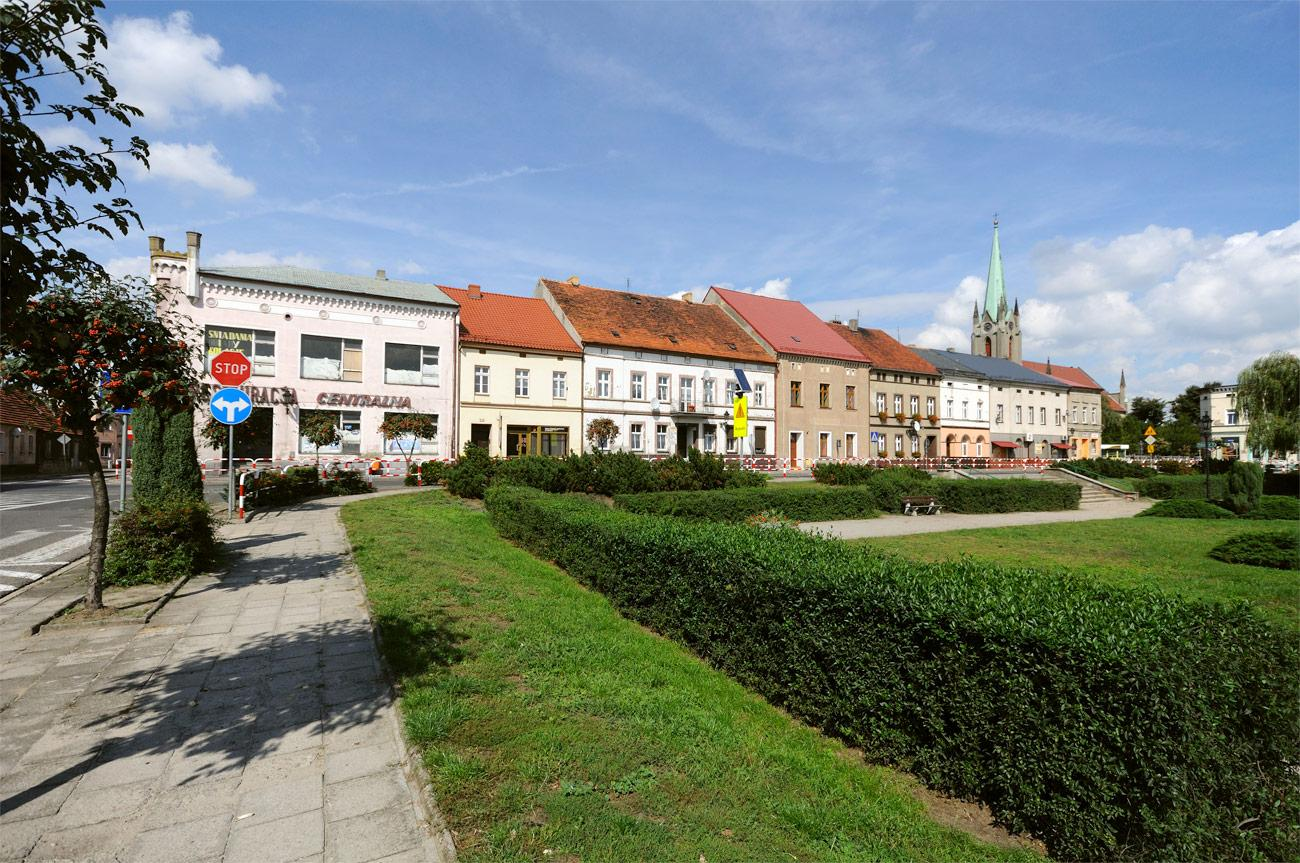 Północna pierzeja bojanowskiego Rynku.